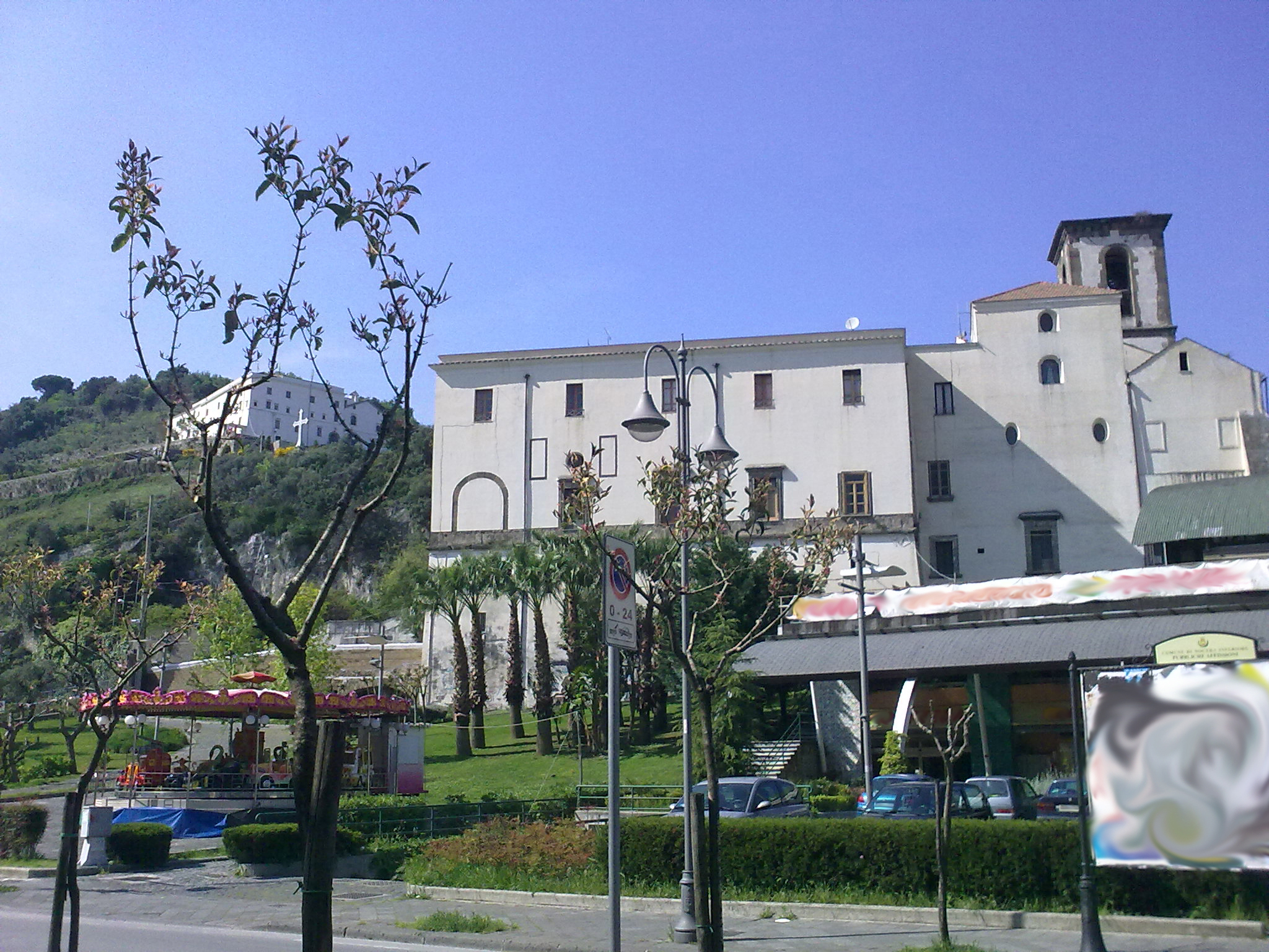 Veduta laterale del convento di Sant'Antonio di Nocera Inferiore